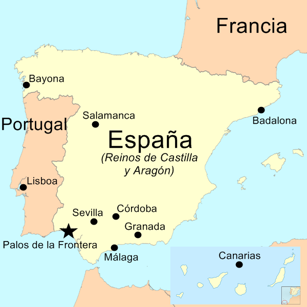 Lugares de trascendencia en el primer viaje de Colón en España y Portugal. Las fronteras corresponden a las naciones en la actualidad, pero la localización de las ciudades es la misma. Los lugares fueron visitados por Colón entre 1484 y y 1493, salvo Bayona, que sólo fue visitada por la carabela de Martín Alonso Pinzón en 1493.